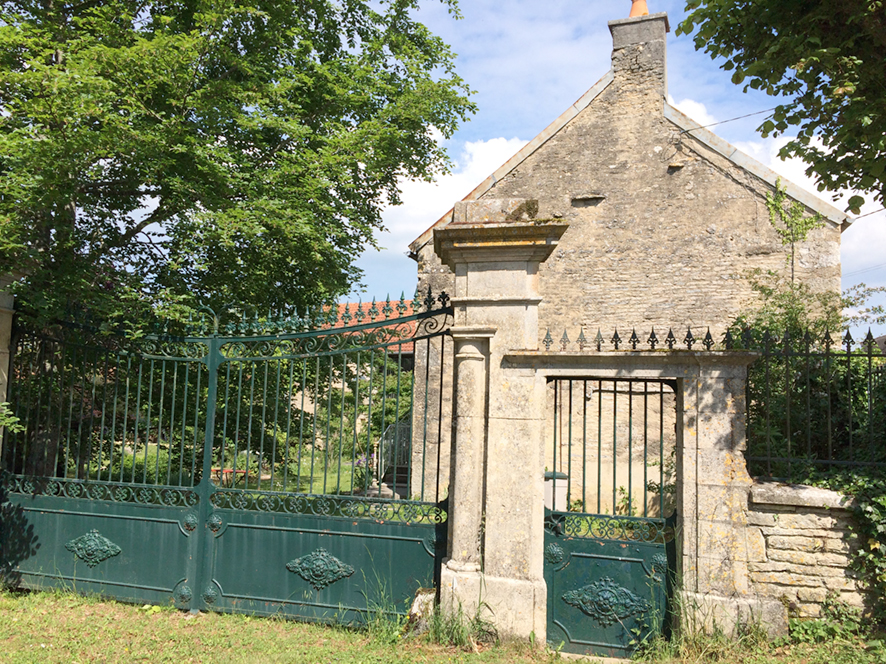 Portail sculpté, daté 1876, Hameau de Massoult, commune de 21330 Nesle-et-Massoult